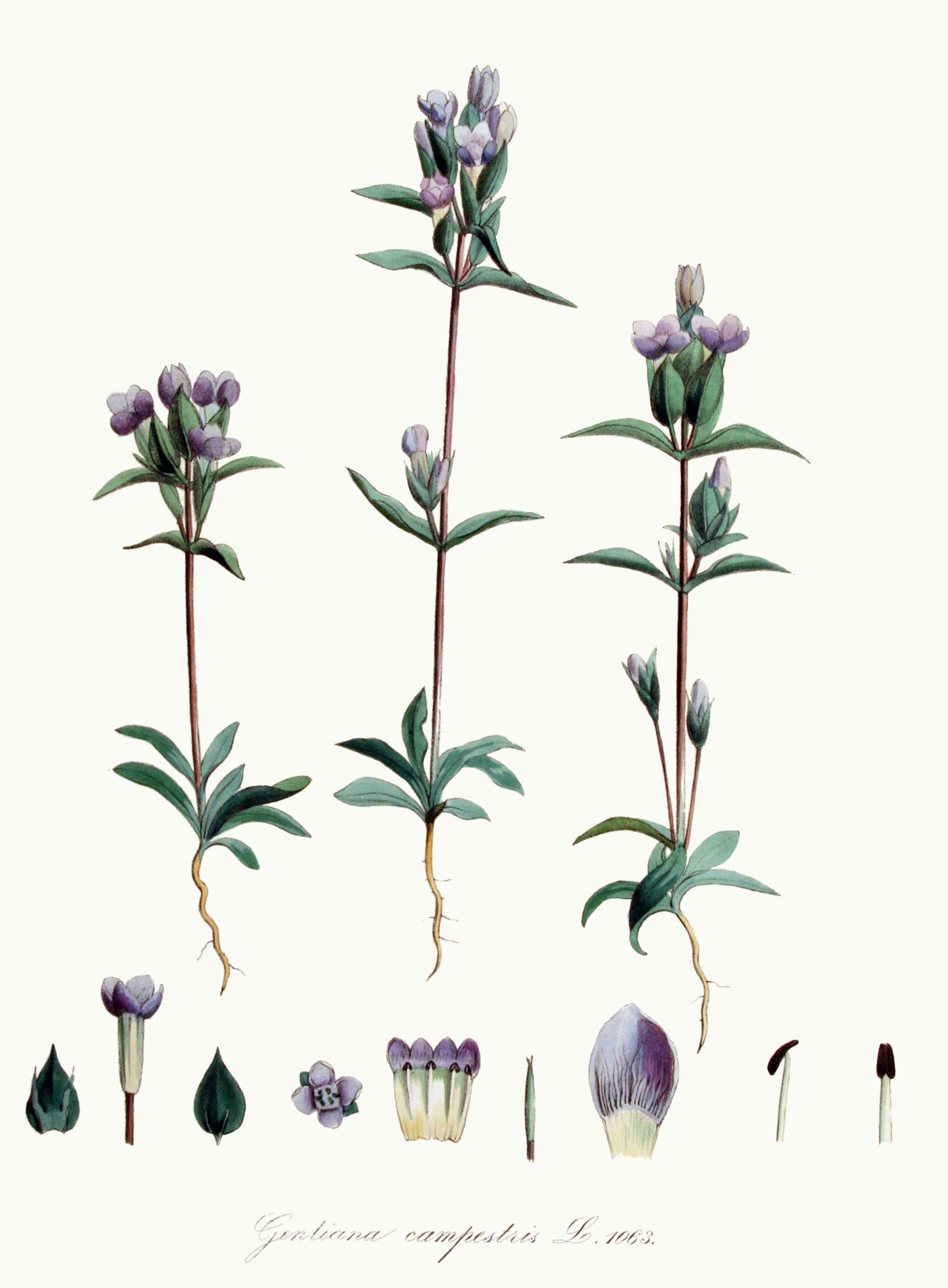 Gentianella campestris (L.) Börner (Syn. Gentiana campestris L.)